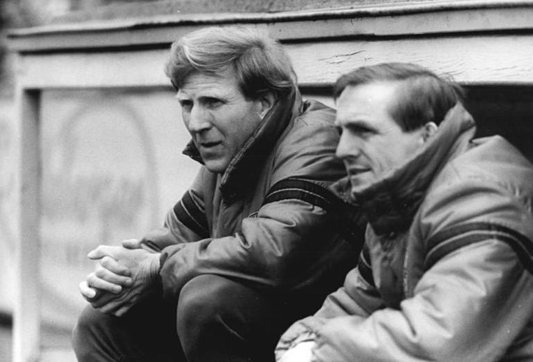 ADN-ZB-Häßler-23.4.86-zin- Dresden: Klaus Sammer (l.) ist seit der Saison 1983-84 verantwortlicher Oberligatrainer bei der SG Dynamo Dresden. Der 43jährige Diplomsportlehrer war bis 1975 aktiver Fußballer (Stahl Gröditz, SC Einheit Dresden, Dynamo Dresden) und absolvierte 17 A-Länderspiele. Von 1977 bis 1983 war er Nachwuchstrainer in Dresden. Rechts der 38jährige Trainer Dieter Riedel.